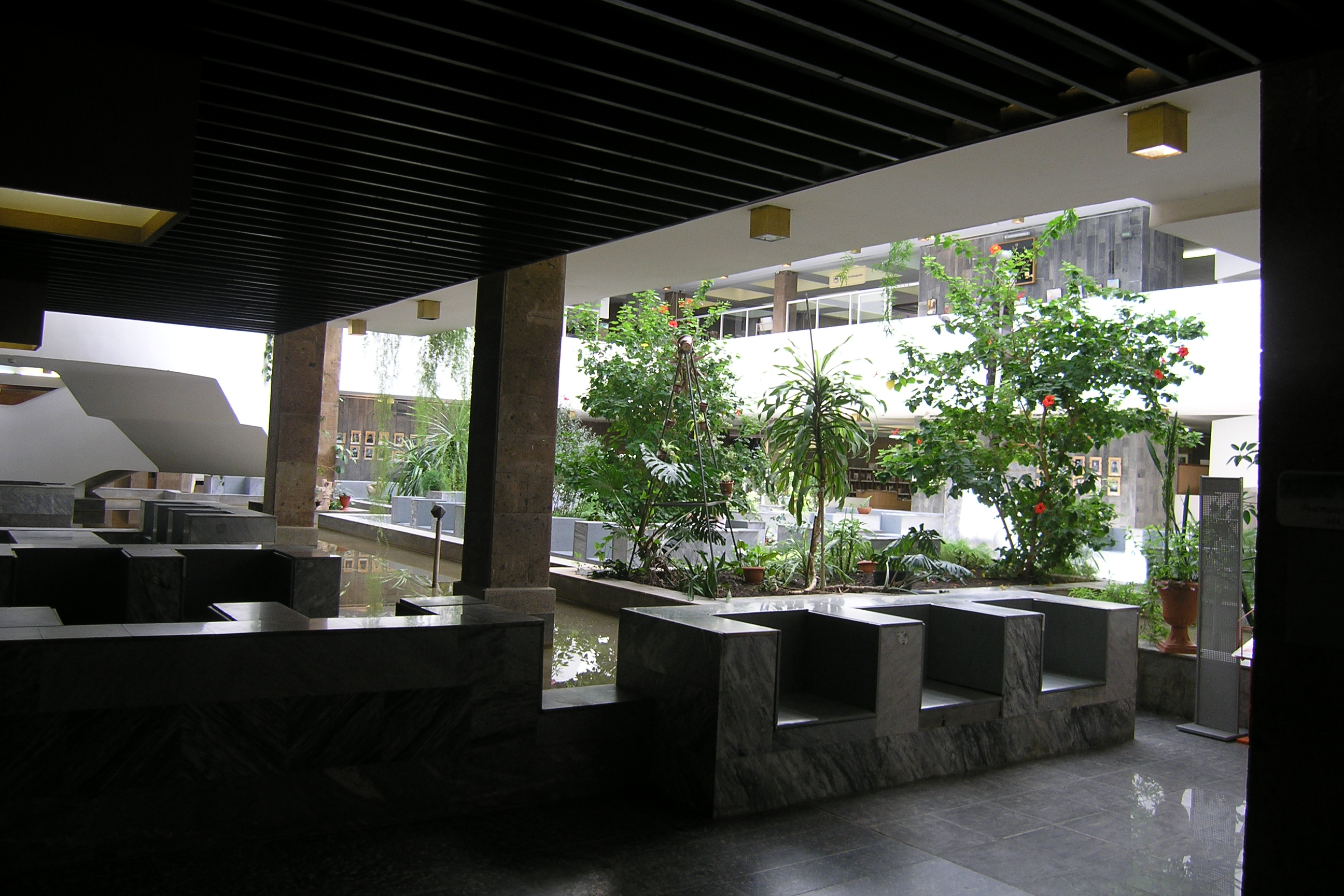 ДГПБ внутри